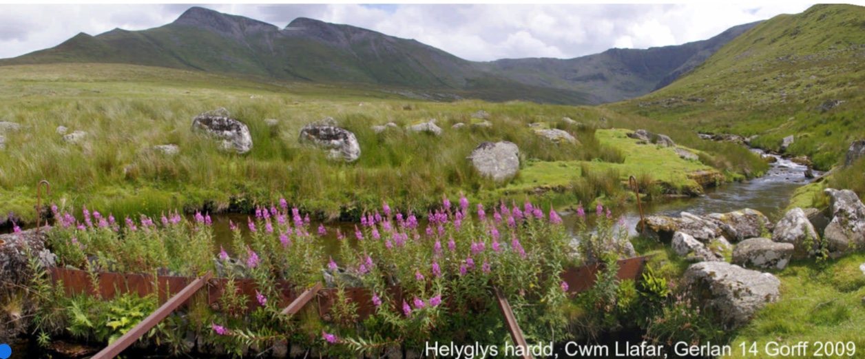 Helyglys hardd yn ei flodau, Cwm Llafar, Gerlan, yn dangos ffafriaeth i adeiladwaith diweddar